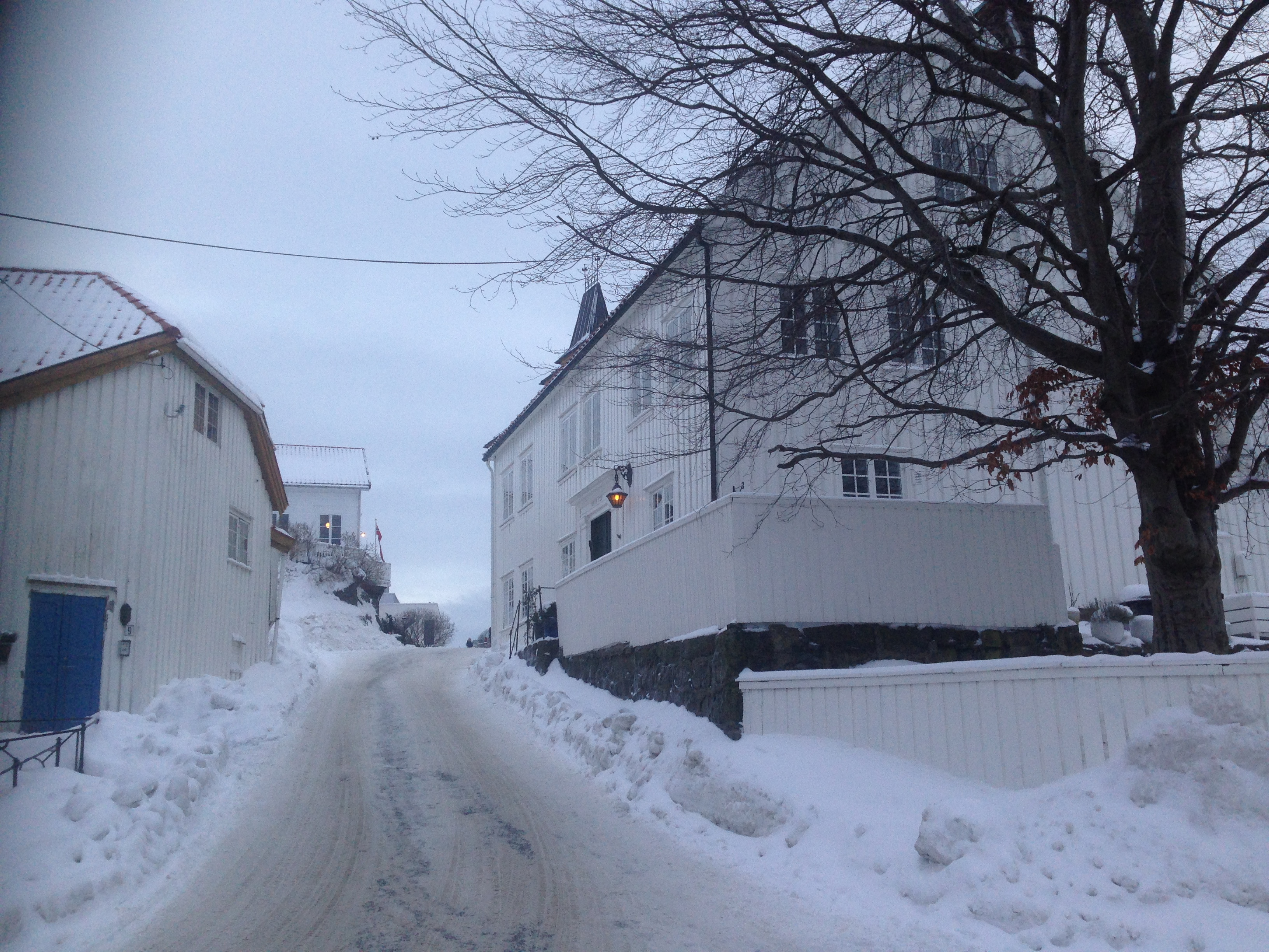 Kirkebakken på Tyholmen strekker seg fra Trefoldighetskirken opp til St. Franciskus skole og St. Franciskus Xaverius kirke.